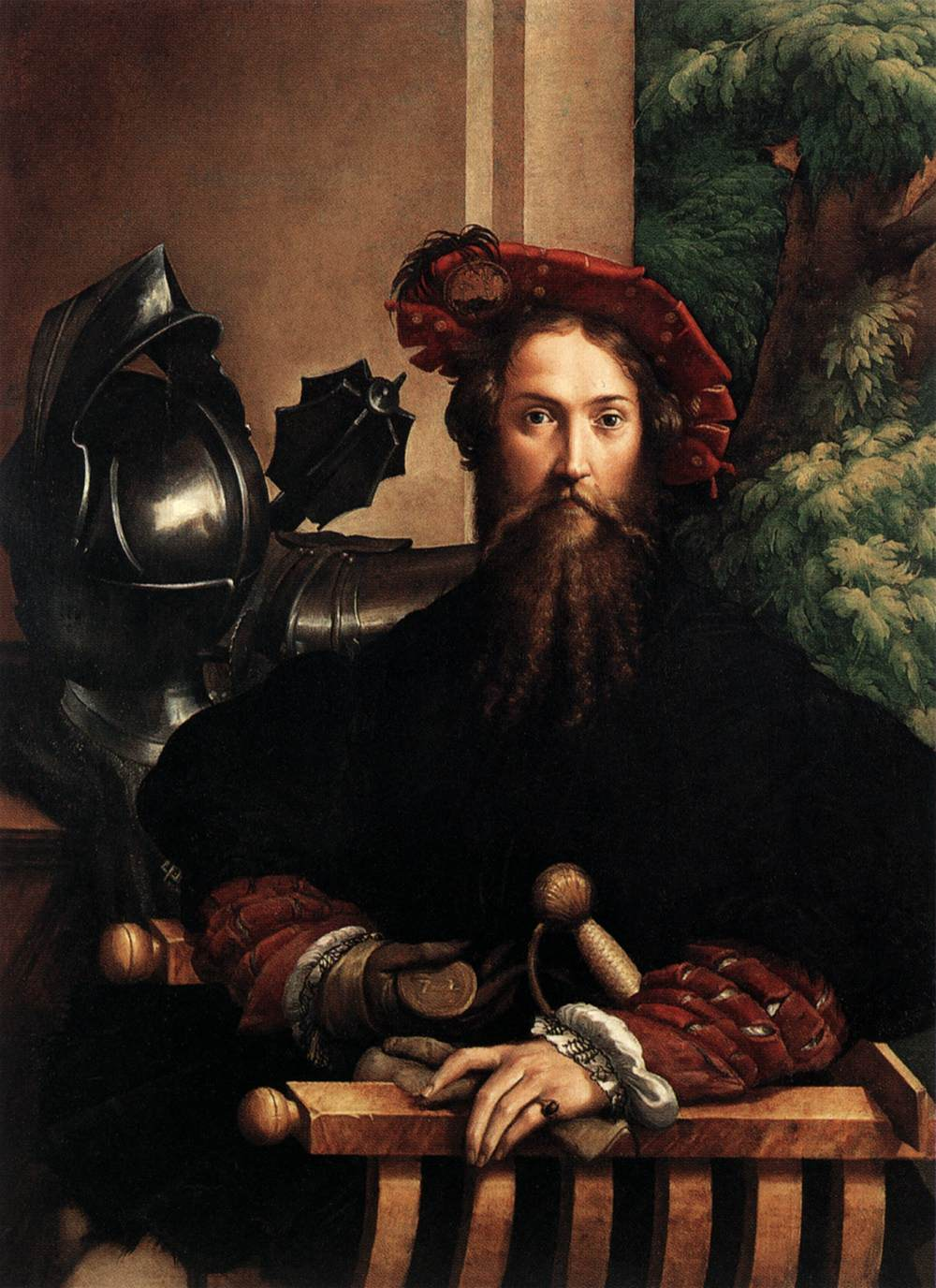 Il Ritratto di Gian Galeazzo Sanvitale di Parmigianino è un quadro (olio su tavola, cm 108 x 80) che si trova a Napoli nel Museo di Capodimonte (inv. Q 111), facente parte della Collezione Farnese.